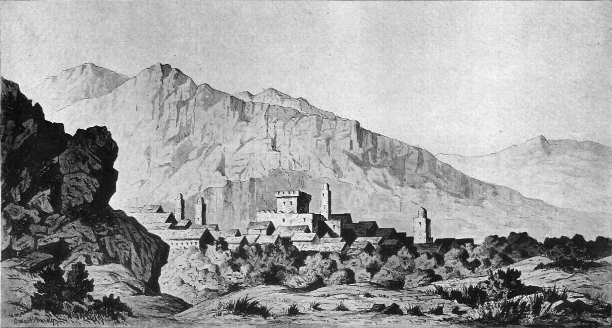 Illustrations de Reconnaissance au Maroc, 1883-1884 : ouvrage illustré de 4 photogravures et 101 dessins d'après les croquis de l'auteur / Albert Dujardin, grav. ; Charles de Foucauld, aut. du texte